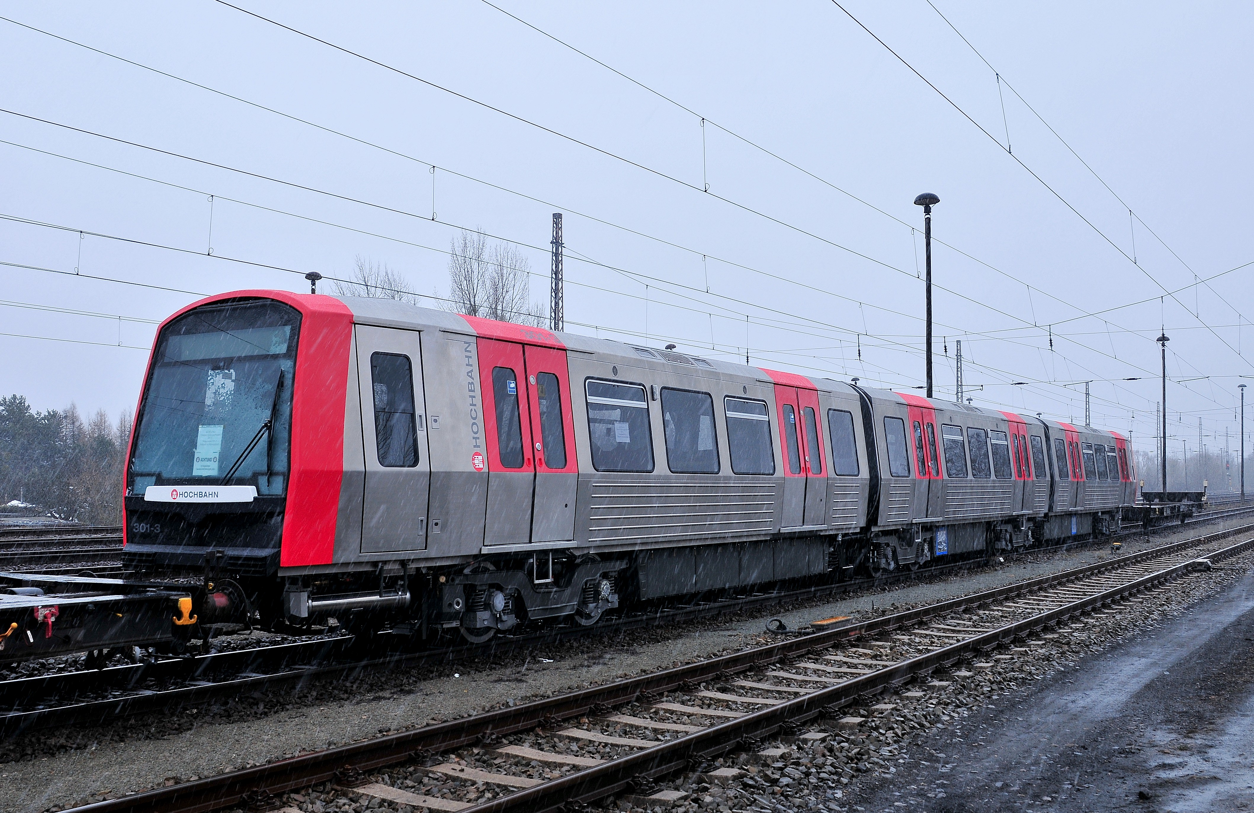 DT5 der Hamburger Hochbahn AG bei der Überführung zum Testgelände nach Hennigsdorf, Aufgenommen bei Priort im März 2010.